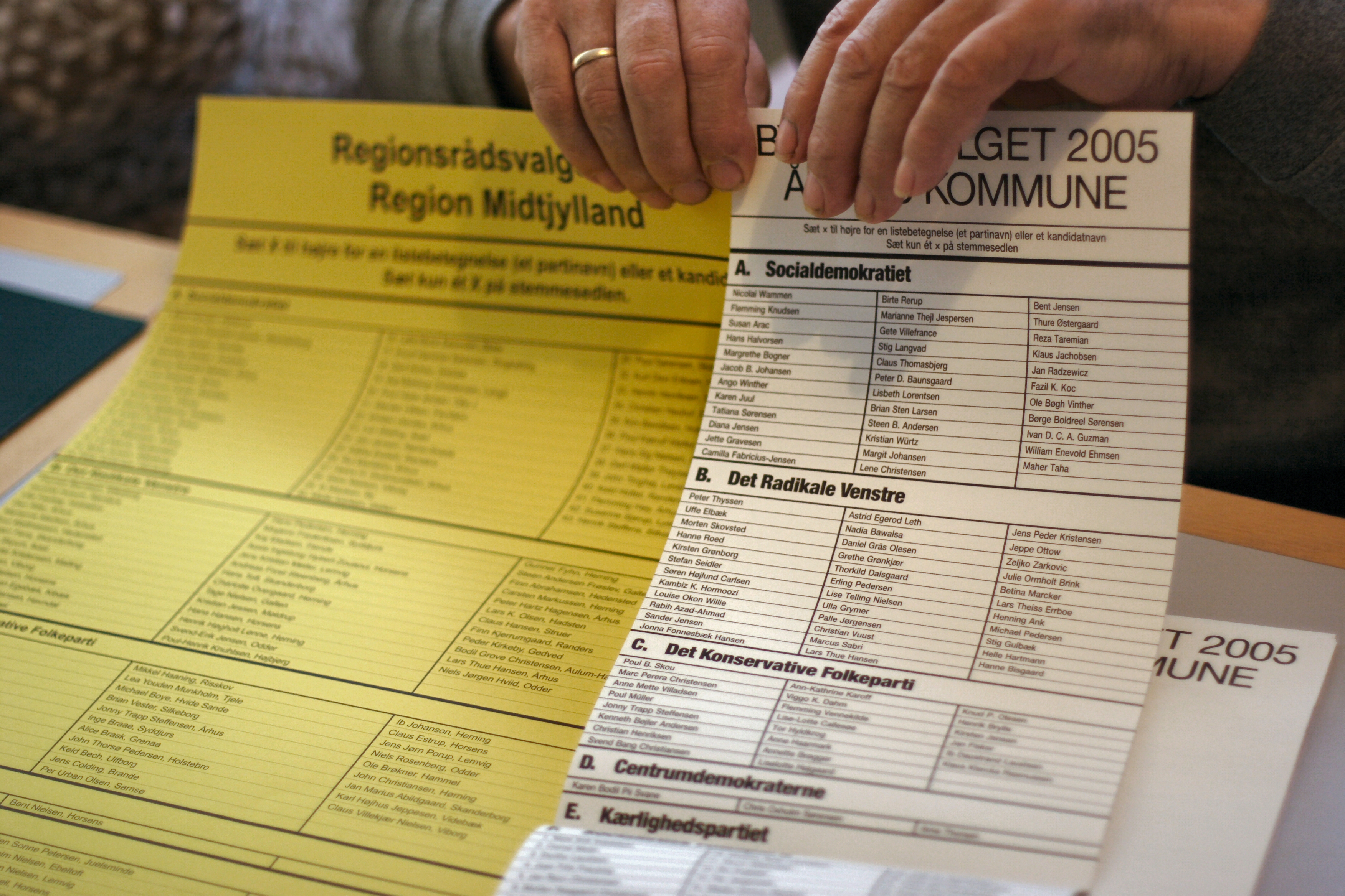 Stemmesedler til kommune- og regionsvalget 2005 i Århus